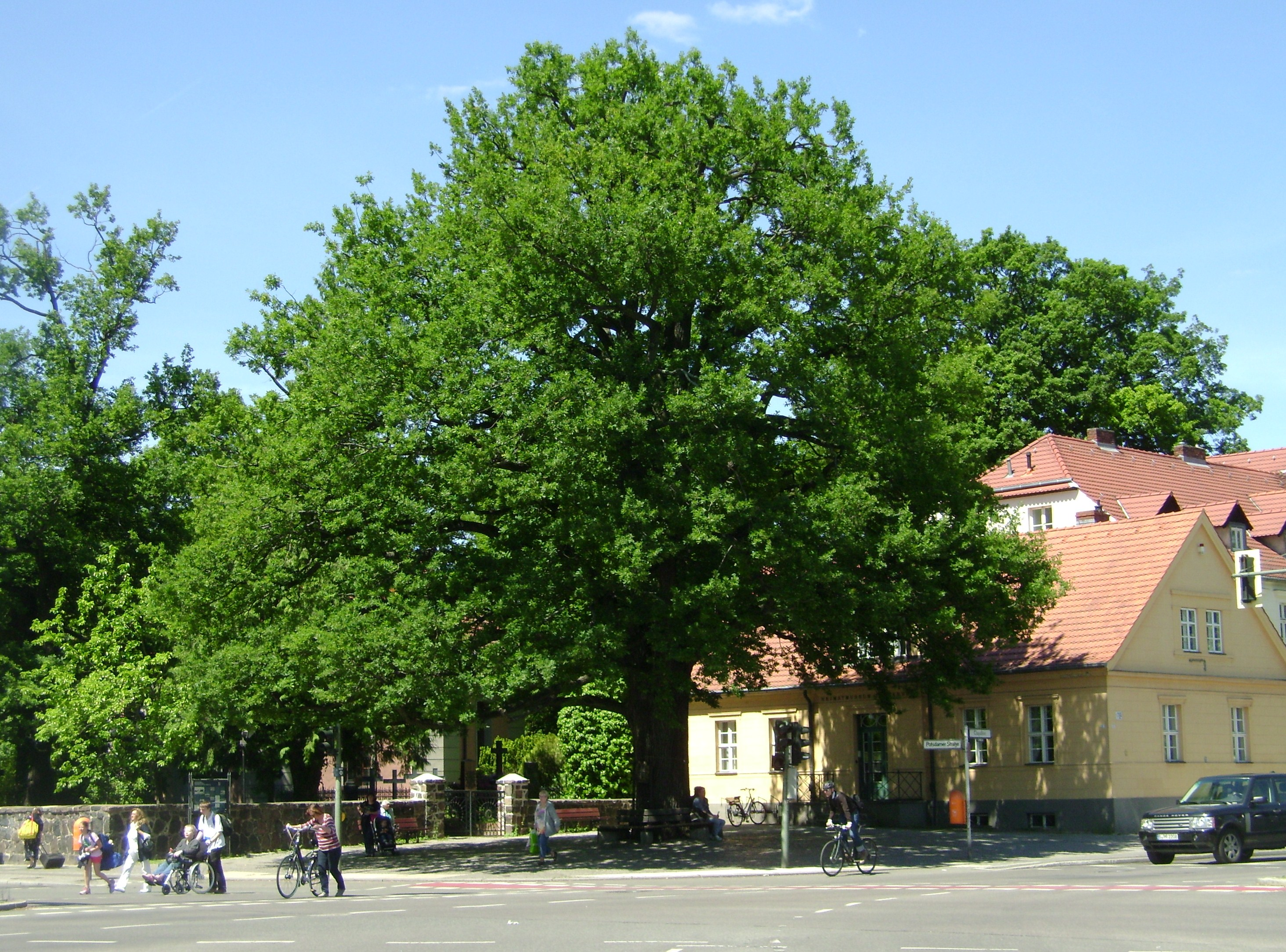 Friedenseiche von 1871 vor dem Alten Schulhaus und Dorffriedhof von Zehlendorf, Clayallee 355 Ecke Potsdamer Straße